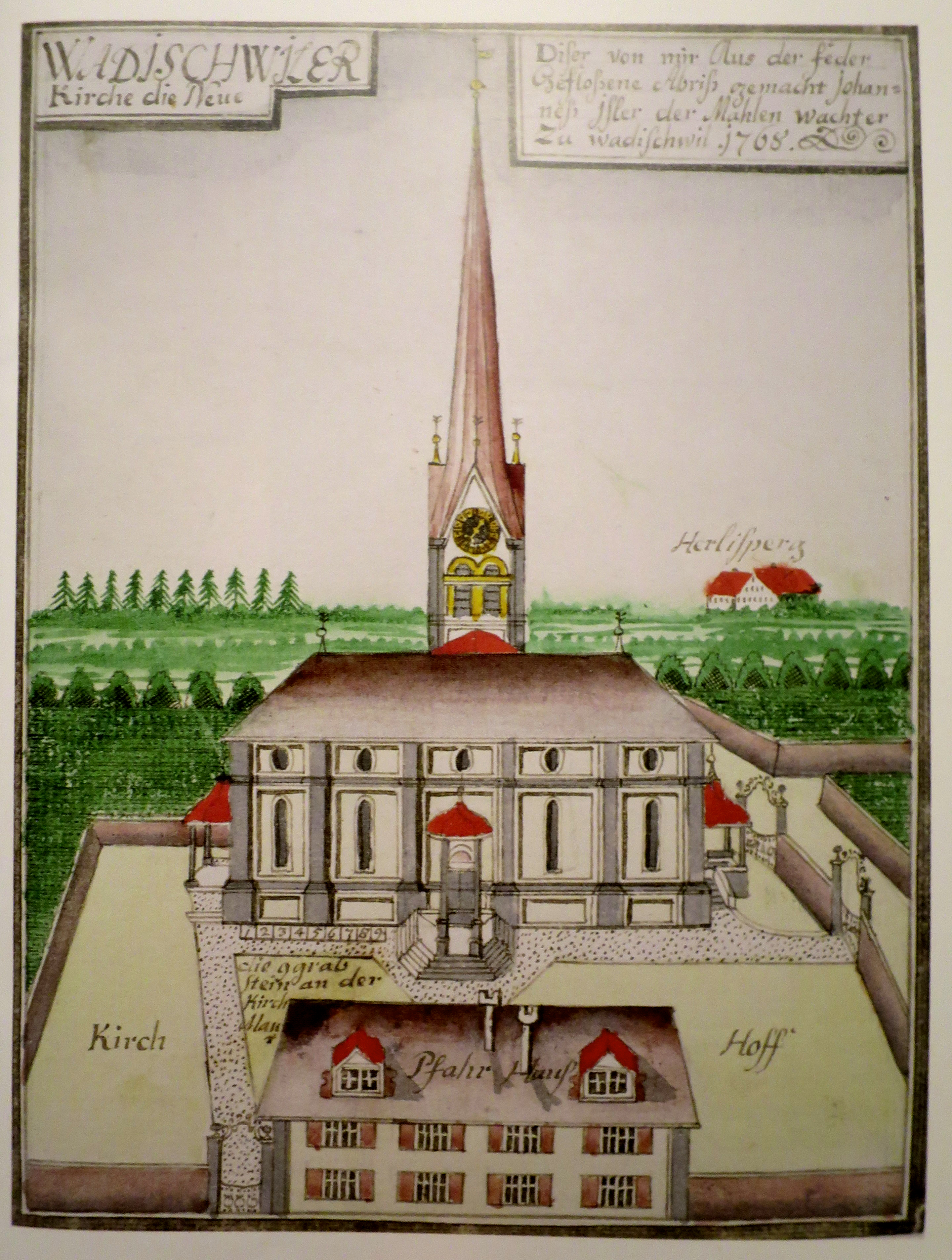 Aquarell der Reformierten Kirche Wädenswil (1767 eingeweiht) von Johannes Isler, 1768